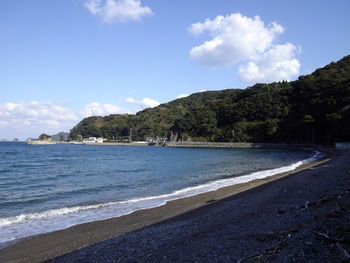 水の子島方面、鶴見碕